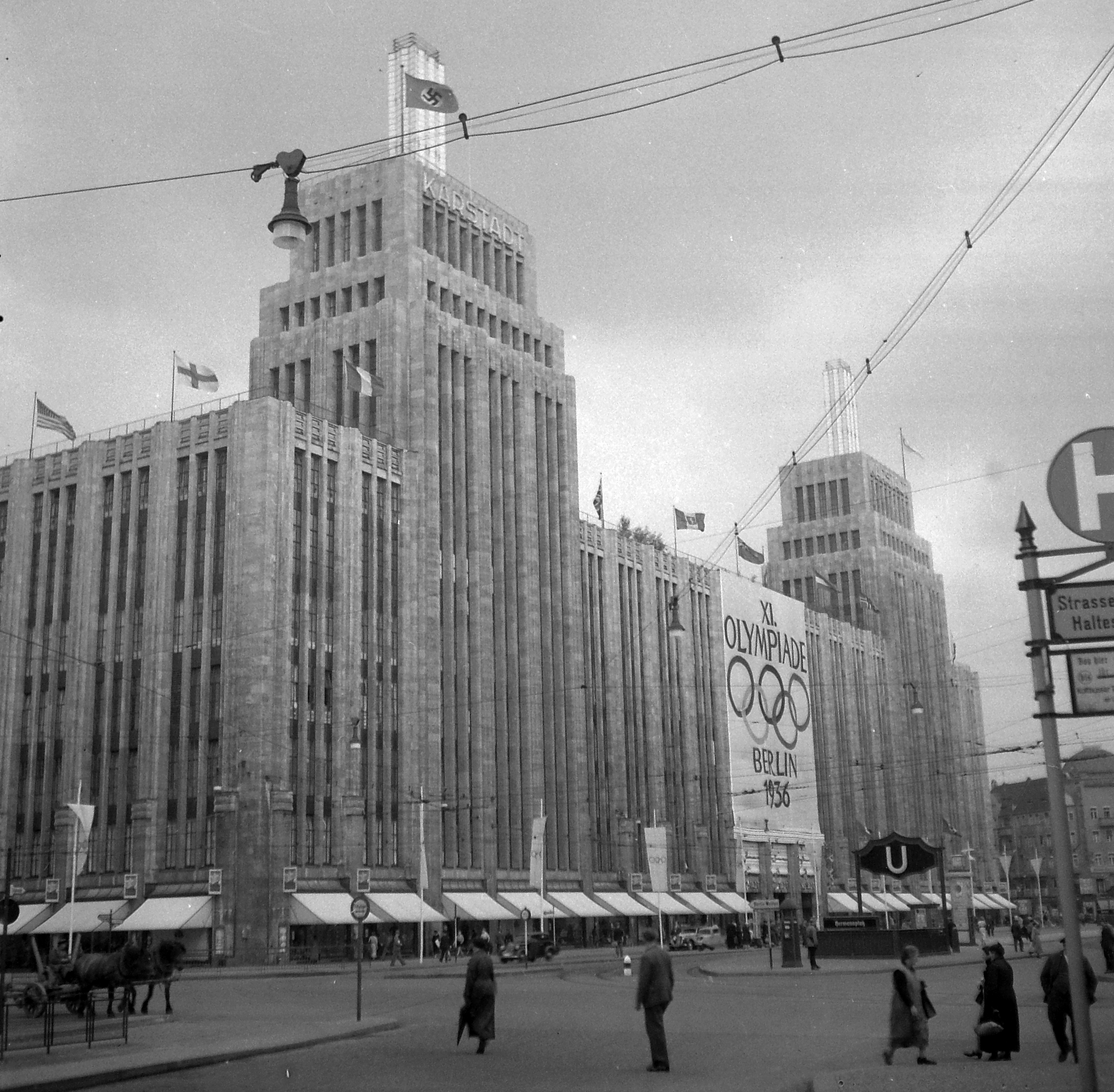 Hermannplatz, Karstadt áruház (a II. világháború során megsemmisült). Location: Germany, Berlin Tags: swastica, Olympics, modern architecture Title: Hermannplatz, Karstadt áruház (a II. világháború során megsemmisült).